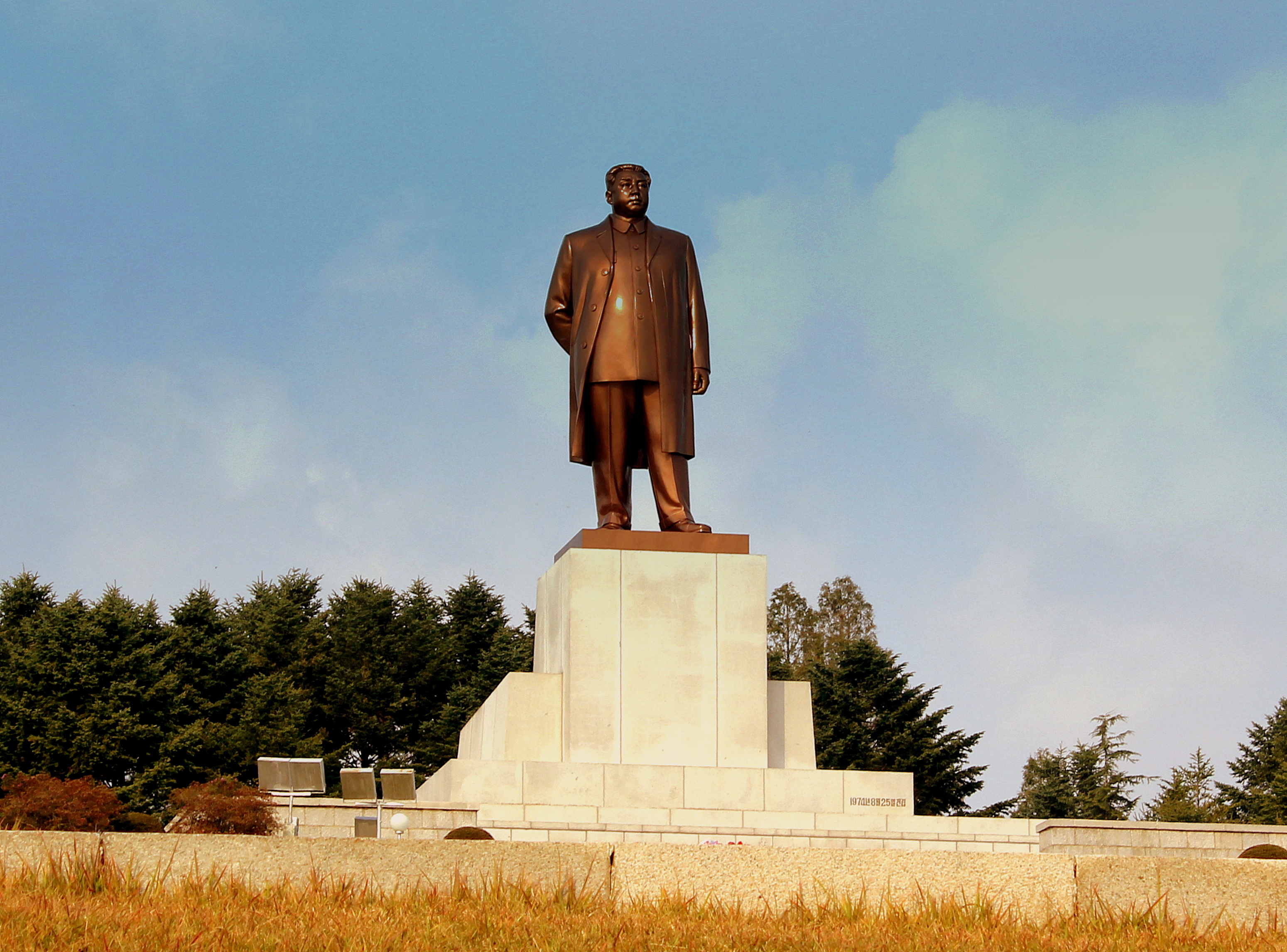 STATUE OF KIM IL SUNG KAESONG CITY DPRK NORTH KOREA OCT 2012